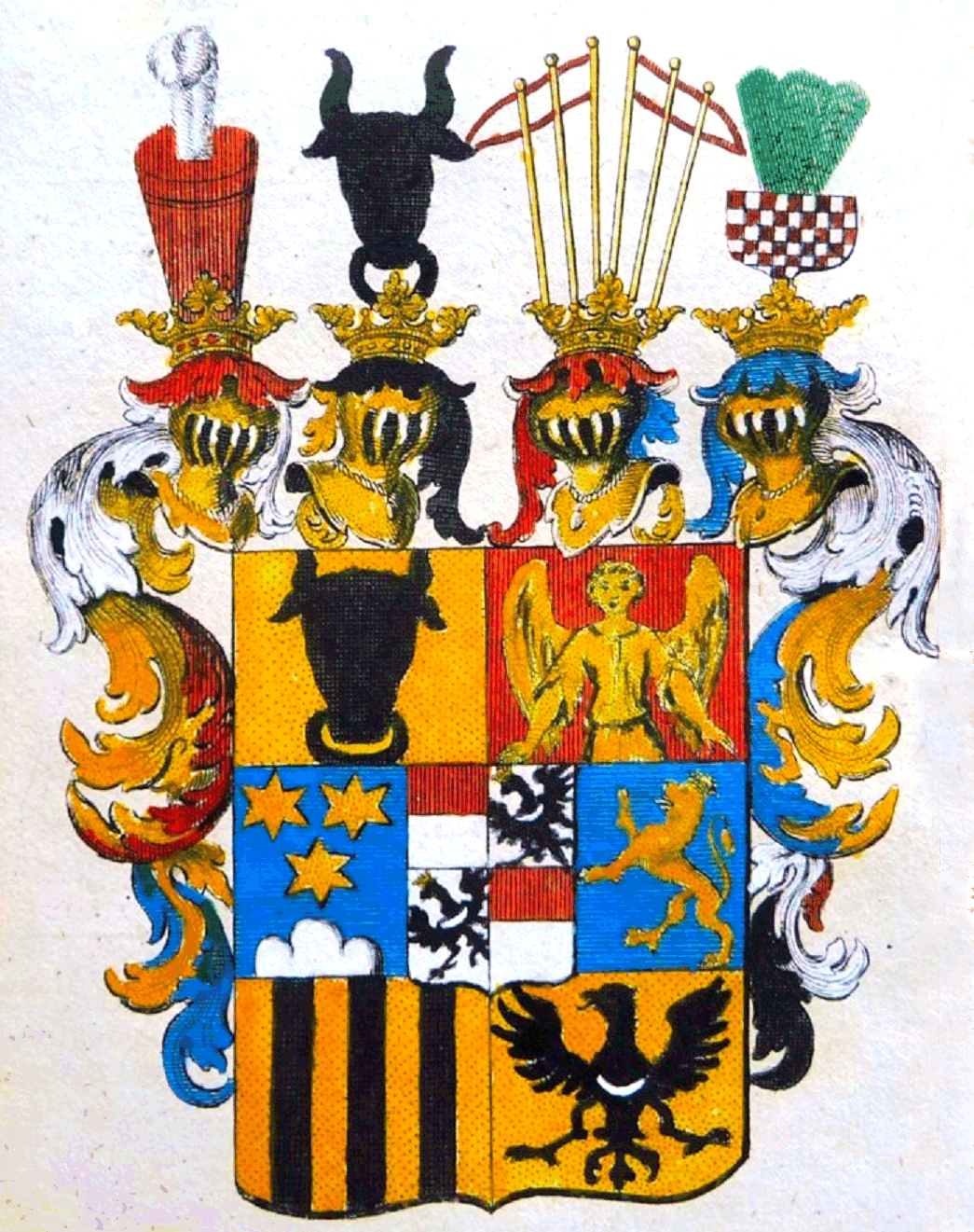 Wappen der Fürsten von Lobkowitz („Fürstl: Lobkowitzisches Wappen“)